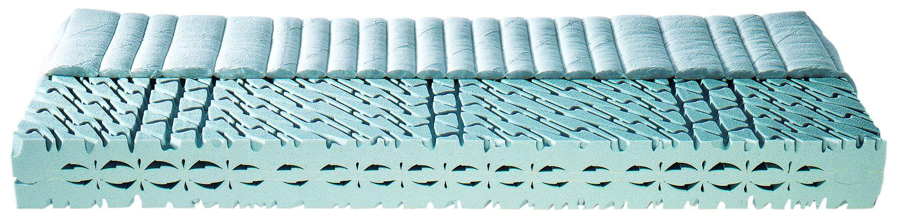 Profil einer siebenfach zonierten PUR Schaumstoffmatratze mit Raumgewicht 60